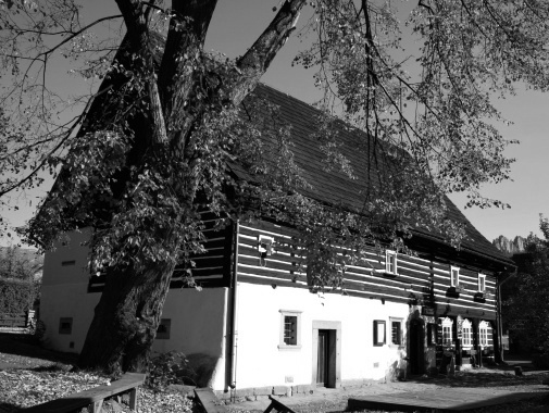 Venkovská usedlost Boučkův statek (Vranové), Vranové 12